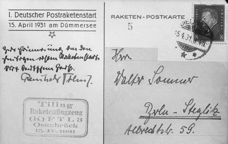 Der erste deutsche Post-Raketenflug! Die erste Raketen-Postkarte der Welt. Diese Postkarte wurde mit der Tilling'schen Post-Rakete am 15. April abgeschossen.